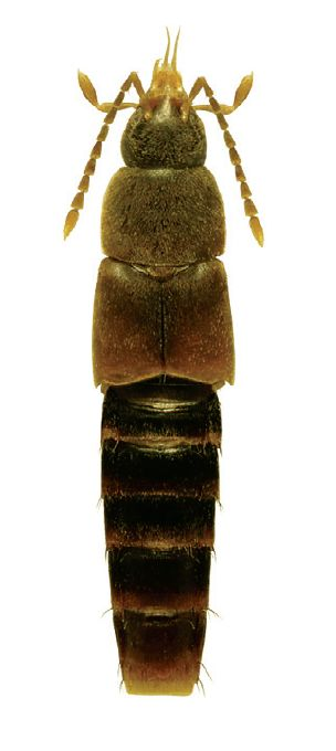 Myllaena procidua